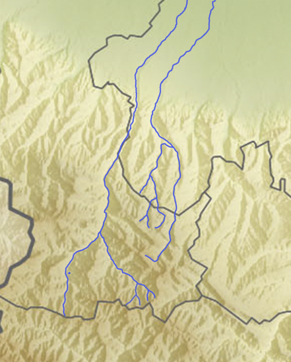 Карта Нашхи